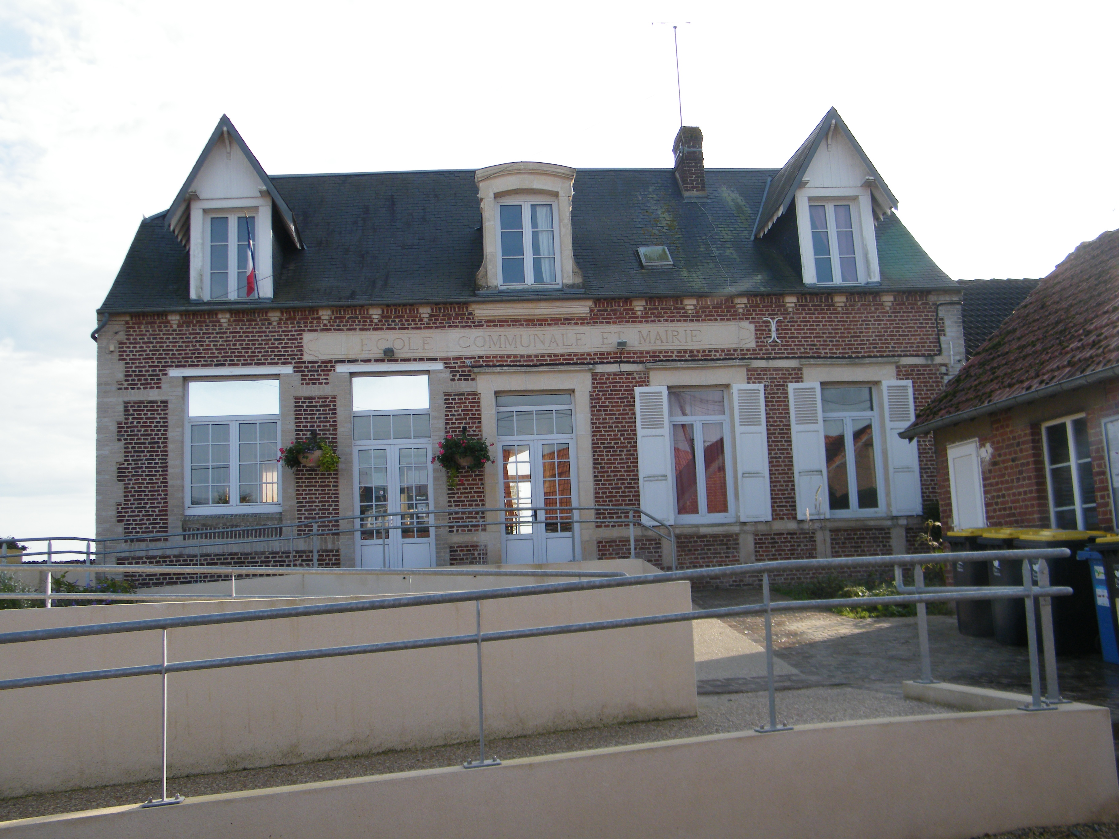 Mairie.